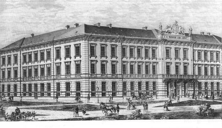 Brno, budova německé vysoké školy technické, kolem roku 1860